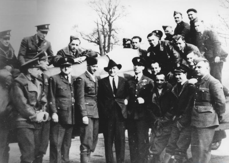 Dywizjon 303 Wizyta w Dywizjonie płk Meriana C. Coopera (dowódcy 7 eskadry w wojnie z Bolszewikami). Stoją w pierwszym rzędzie: por. Wojciech Kołaczkowski, por. Zdzisław Henneberg, płk Bogdan Kwieciński, por. Mirosław Ferić, płk Merian C. Cooper, mjr Witold Urbanowicz, ppor. Bogdan Grzeszczak, st. sierż. Mieczysław Popek, st. sierż. Mozut. U góry: por. Wiktor Srzembosz, por. Tadeusz Arentowicz, st. sierż. Mieczysław Adamek i grupa mechaników.